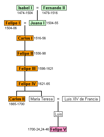 Árbol genealógico de los reyes de España de la casa de Austria, incluyendo su relación de parentesco con sus antecesores de la casa de Trastámara, y sus sucesores de la casa de Borbón